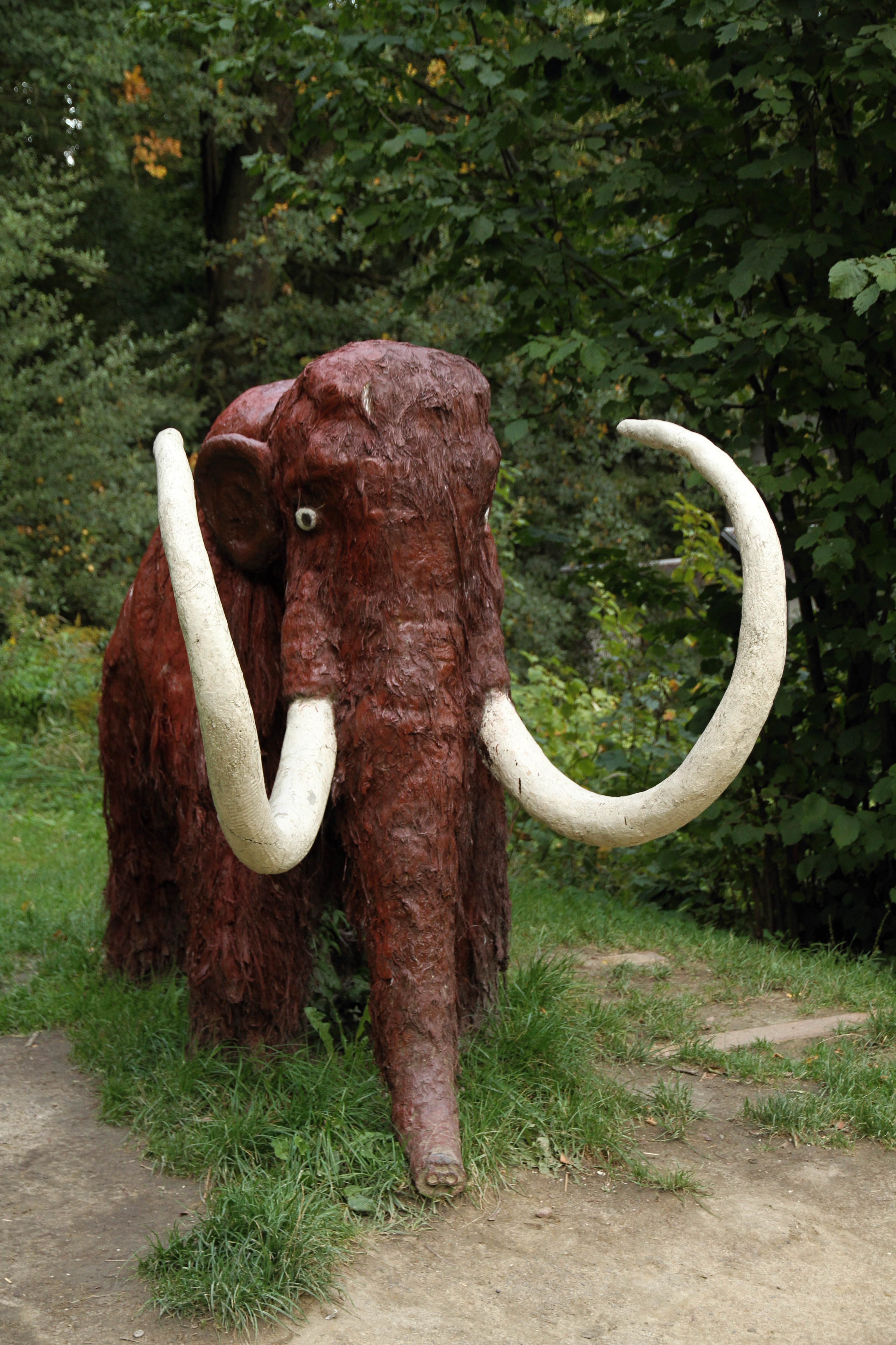 Mamut na Landeku